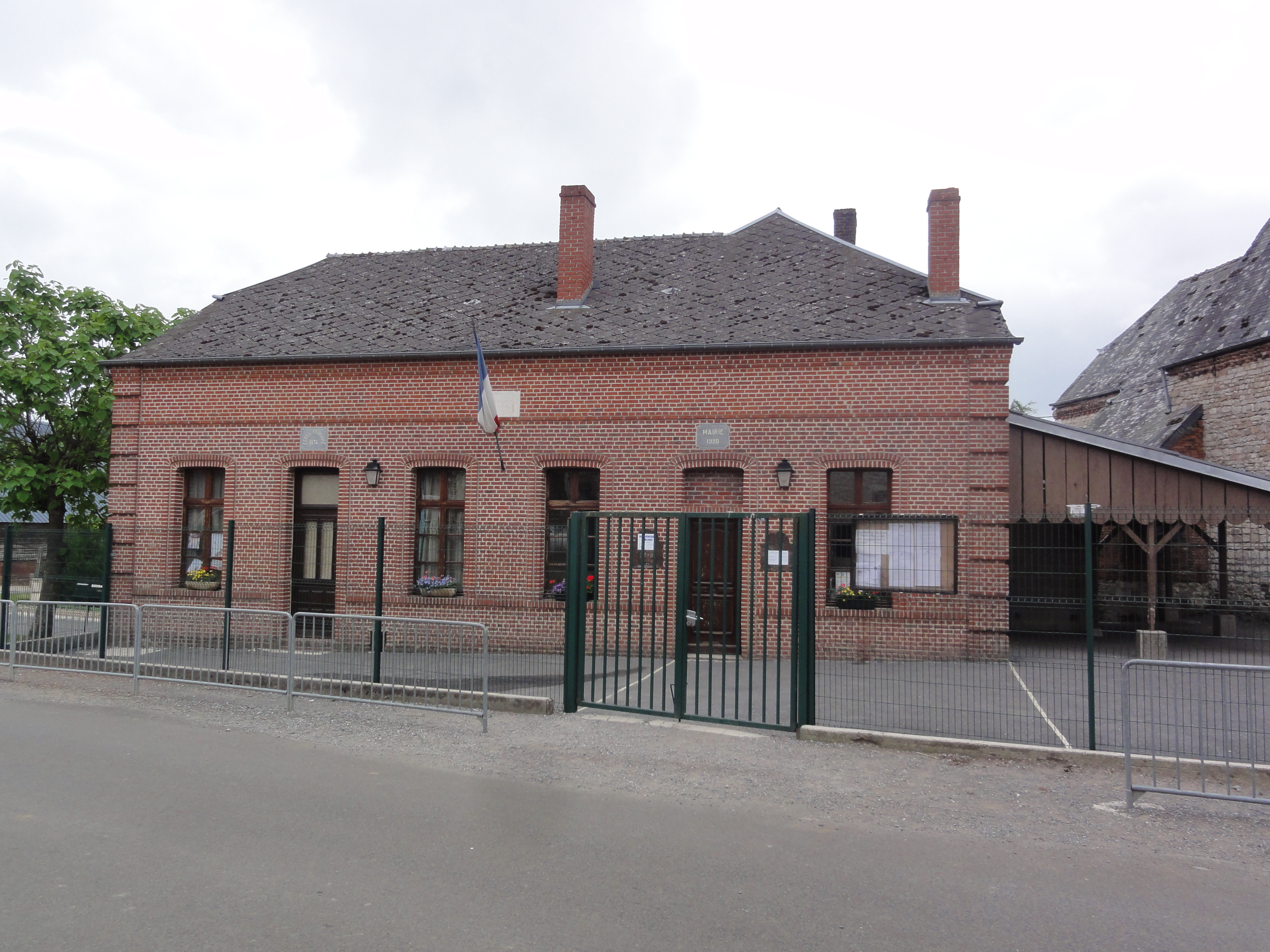 Leuze (Aisne) mairie et école